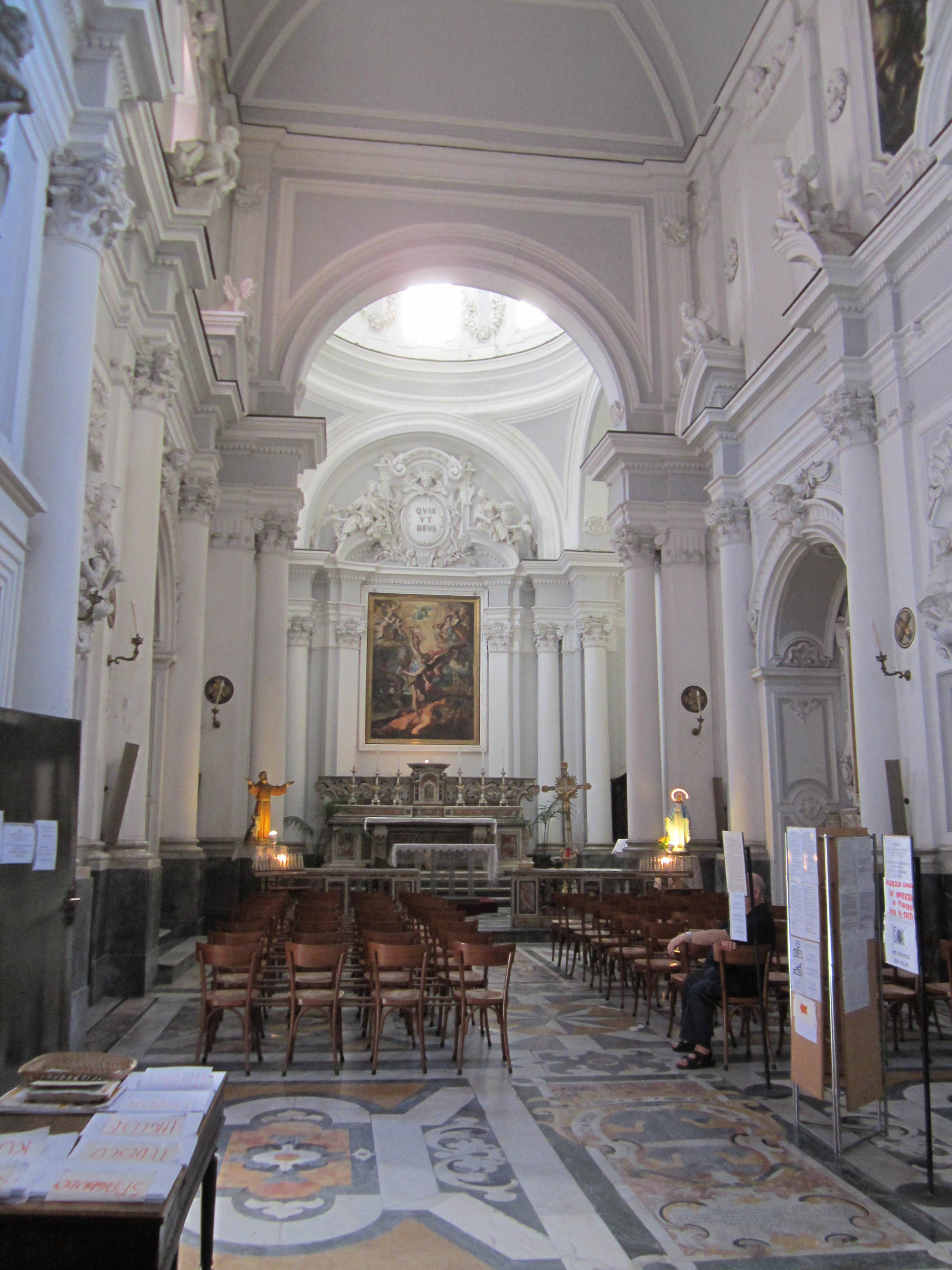 Interno della Chiesa di sant'Angelo a Nilo